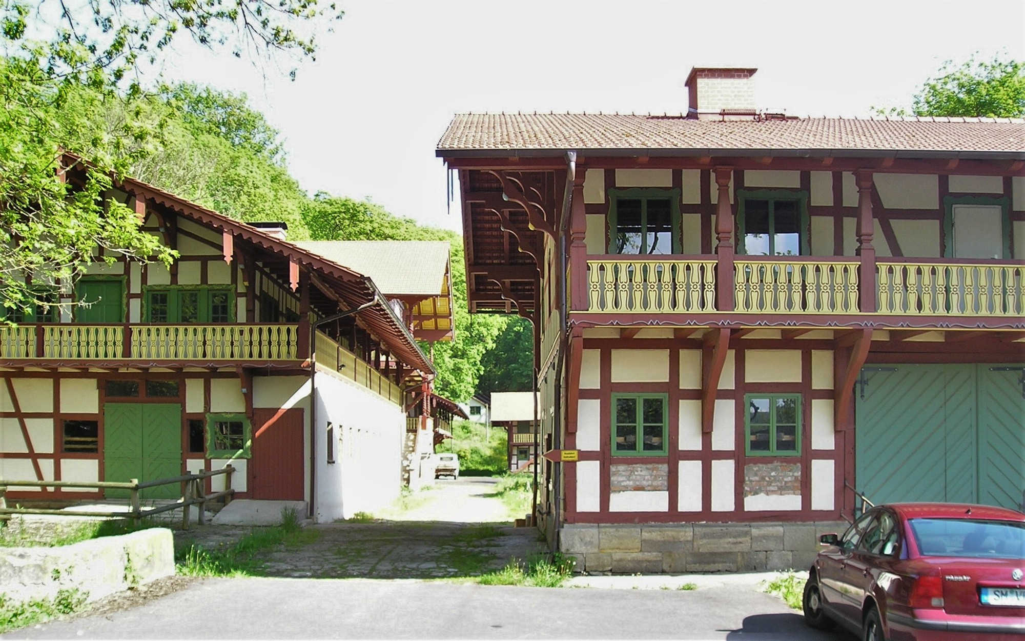 Gutshof Meierei in Meiningen, Werkstatt/Remise und Bauernhaus (links)